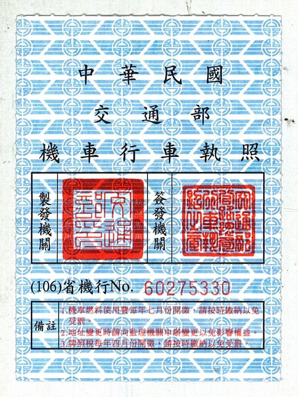 中華民國交通部機車行車執照正面，背景圖案為交通部公路總局局徽。